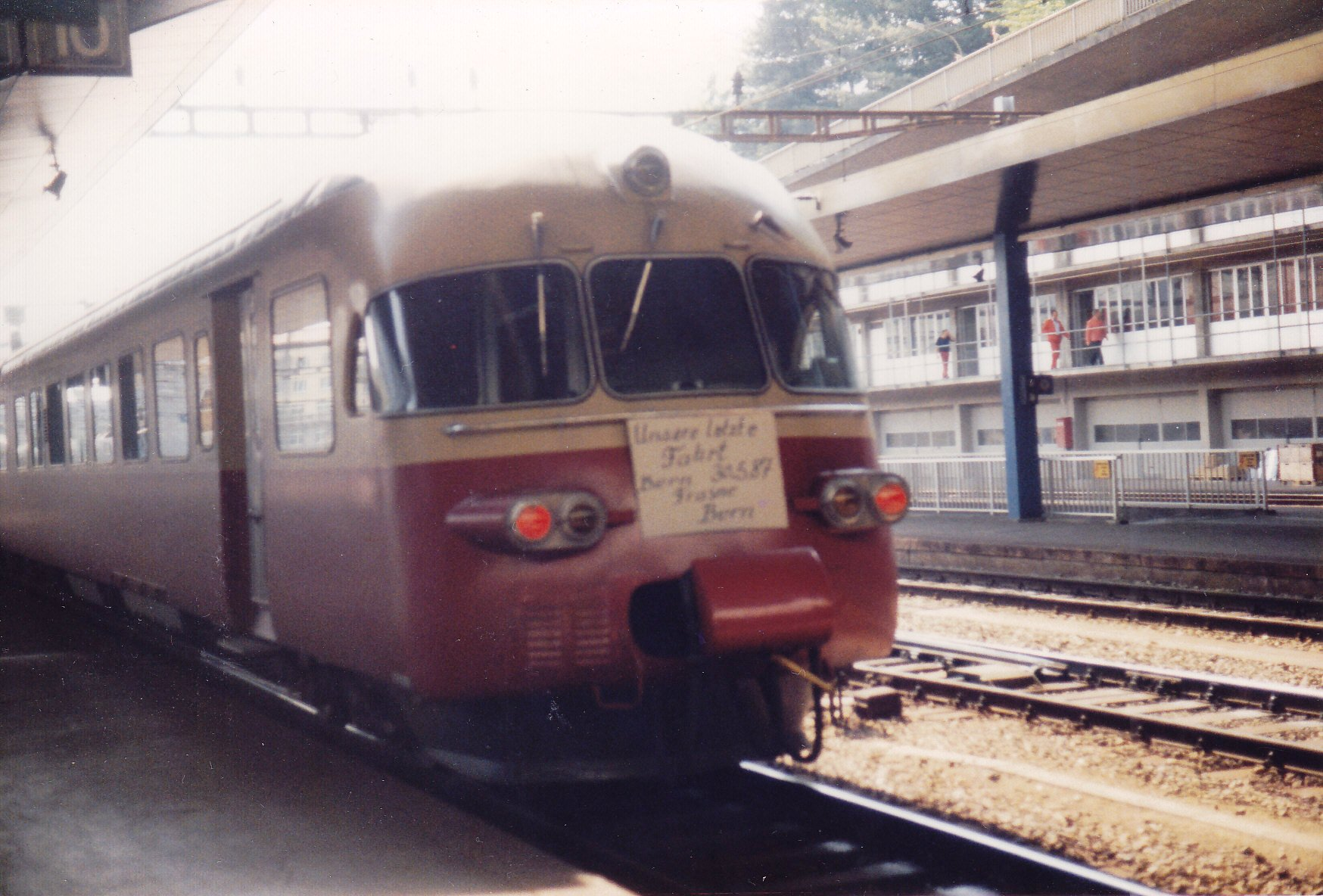 Ultimo viaggio da Berna treno SBB RAe 1050